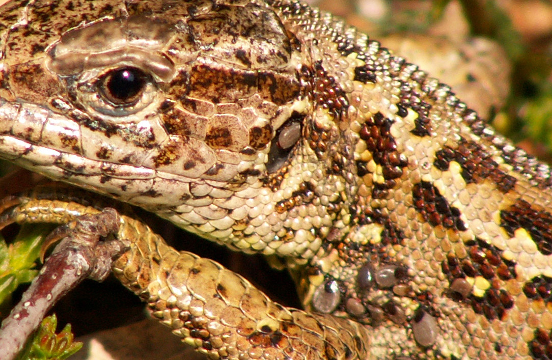 Tiques sur une femelle de lézard Lacerta agilis ; Zoom effectué sur une photographie de Viridiflavus déposée sur Wikimedia Commons, datée du 5 mai 2008